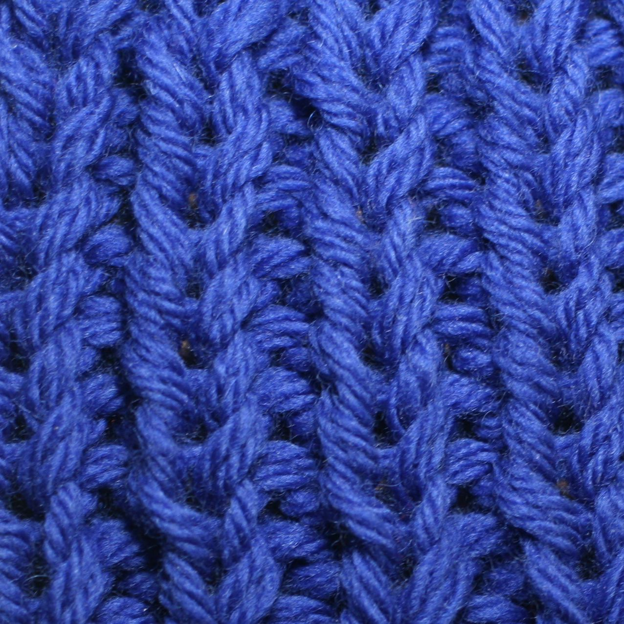 Ribbing (knitting)